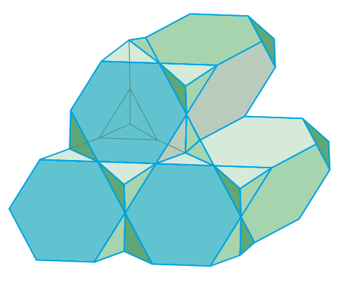 ダイヤモンド結晶ノボロノイ図